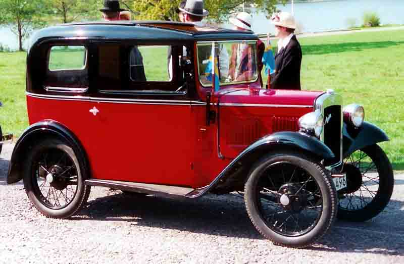 Austin Seven Box Saloon 1933